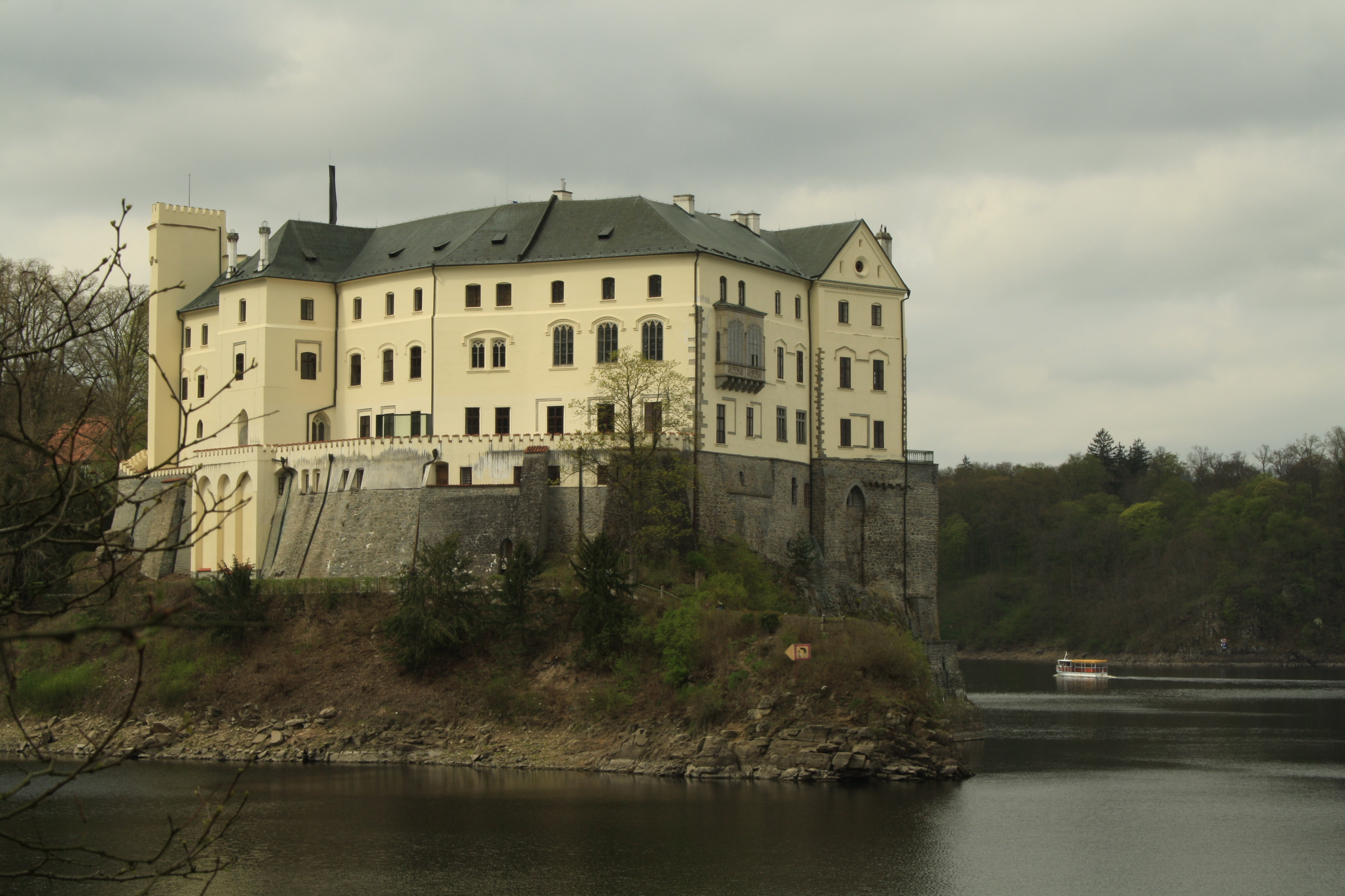 Zámek Orlík, Orlík nad Vltavou 112, Orlík nad Vltavou.